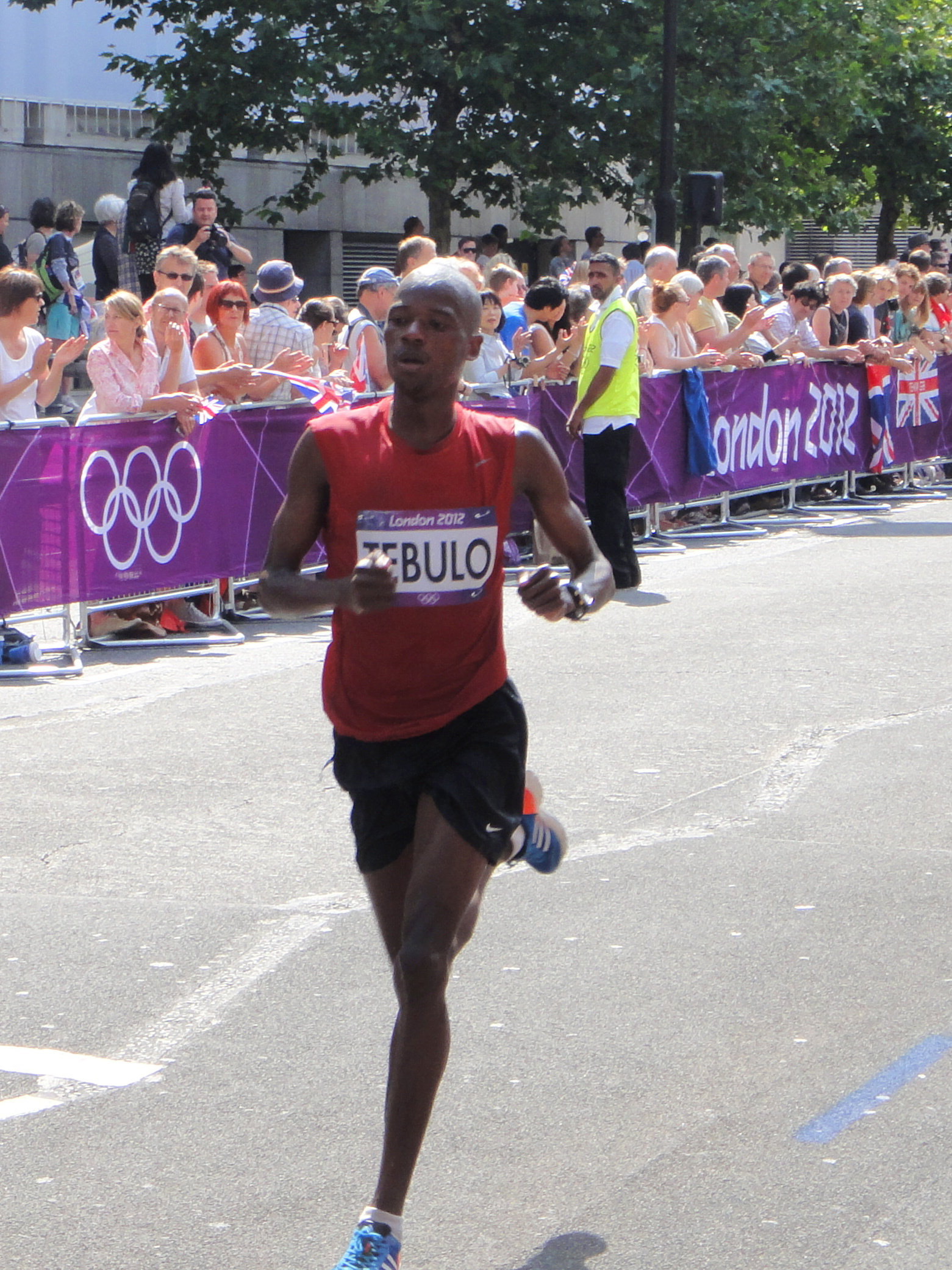 Mike Tebulo (Malawi) - London 2012 Men's Marathon